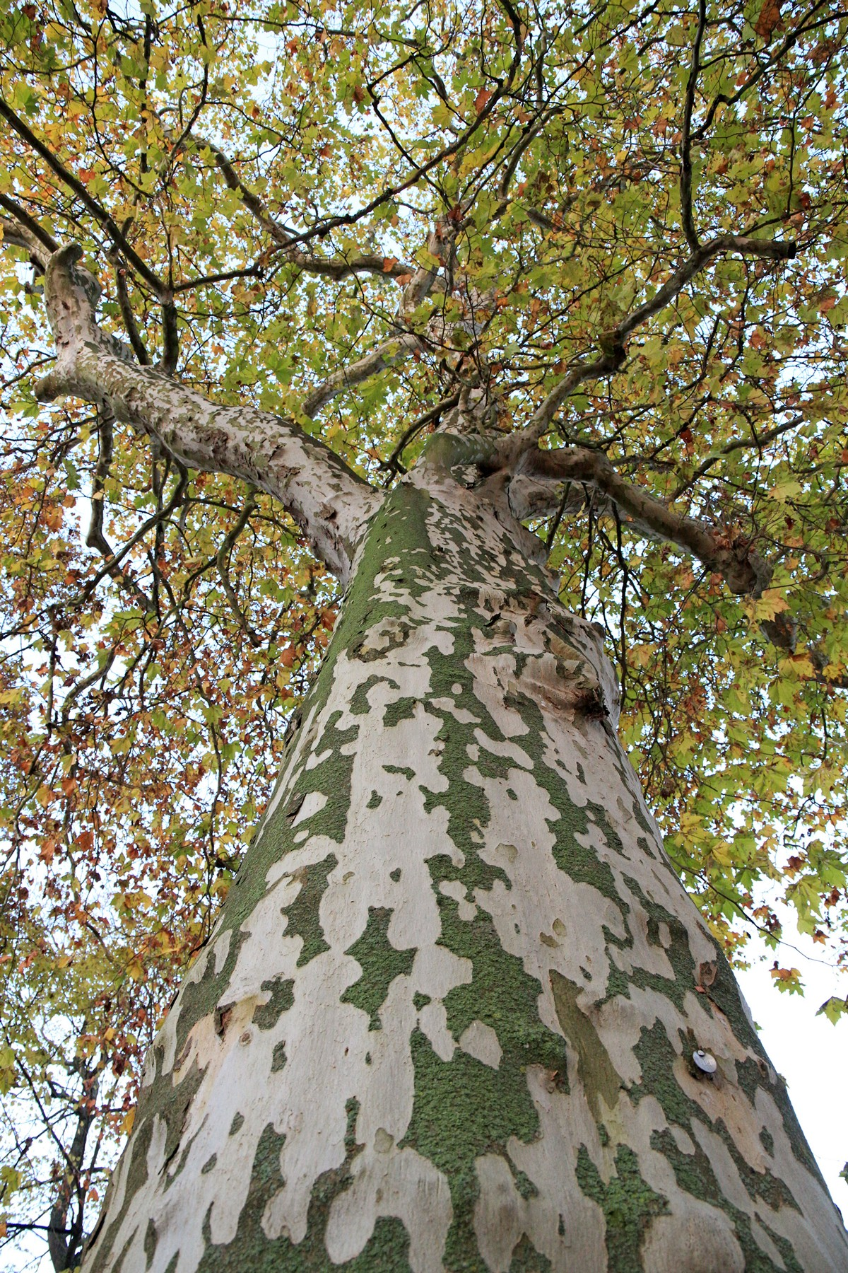 Stamm einer Platane